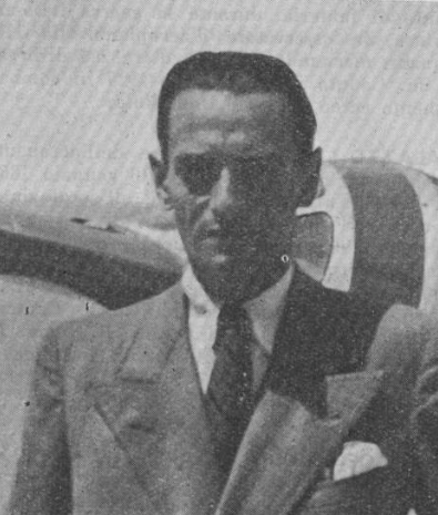 Cesare Pallavicino, ingegnere e tecnico aeronautico